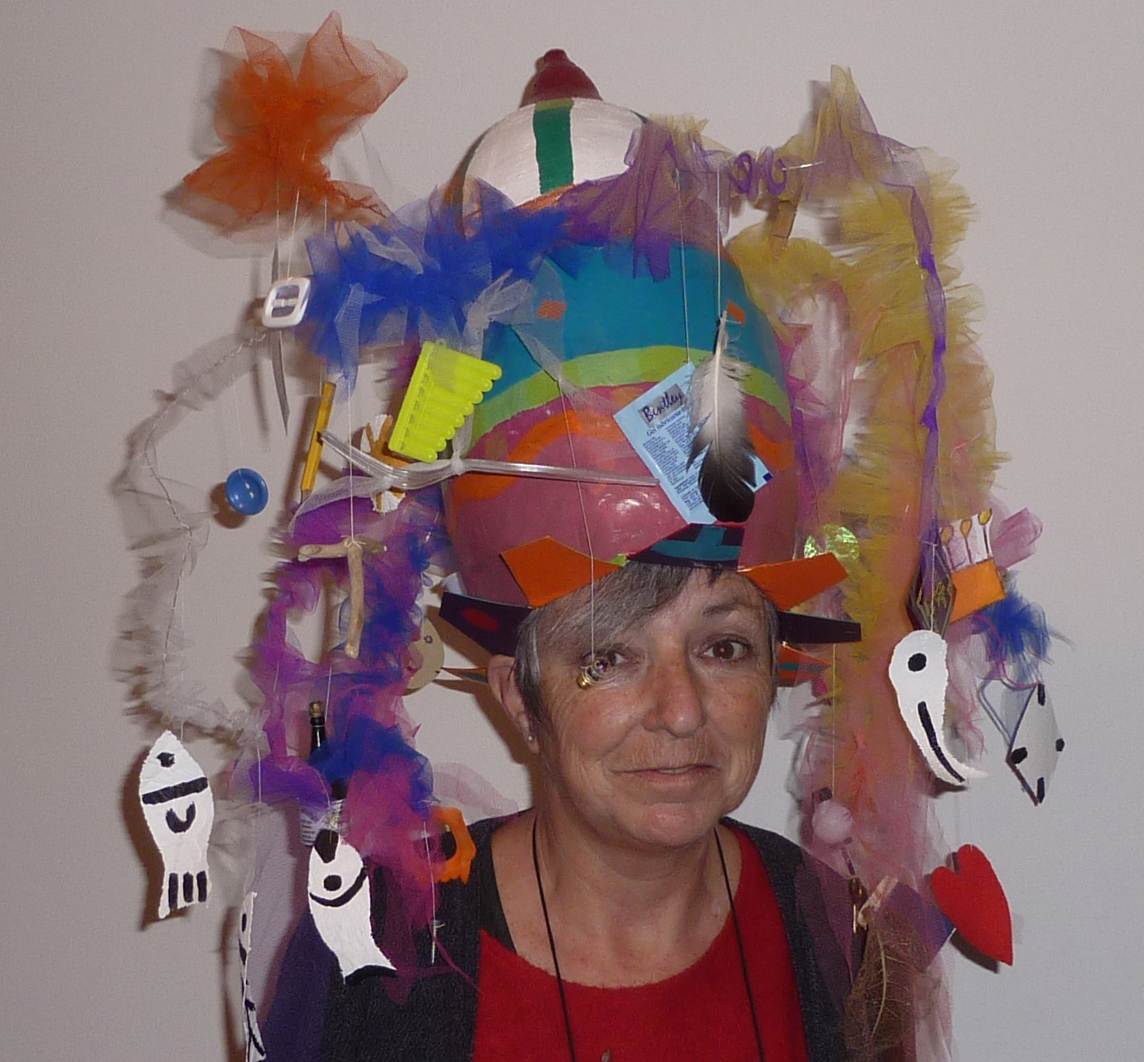 Fotografía de la Artista